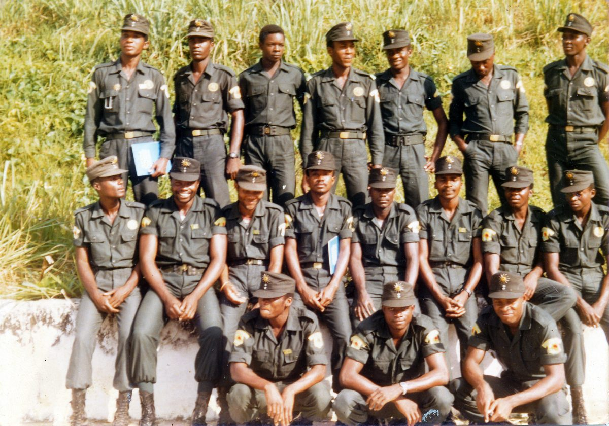 Parade pour la remise des brevets commando à la première promotion de la Garde Civile à Kota-Koli